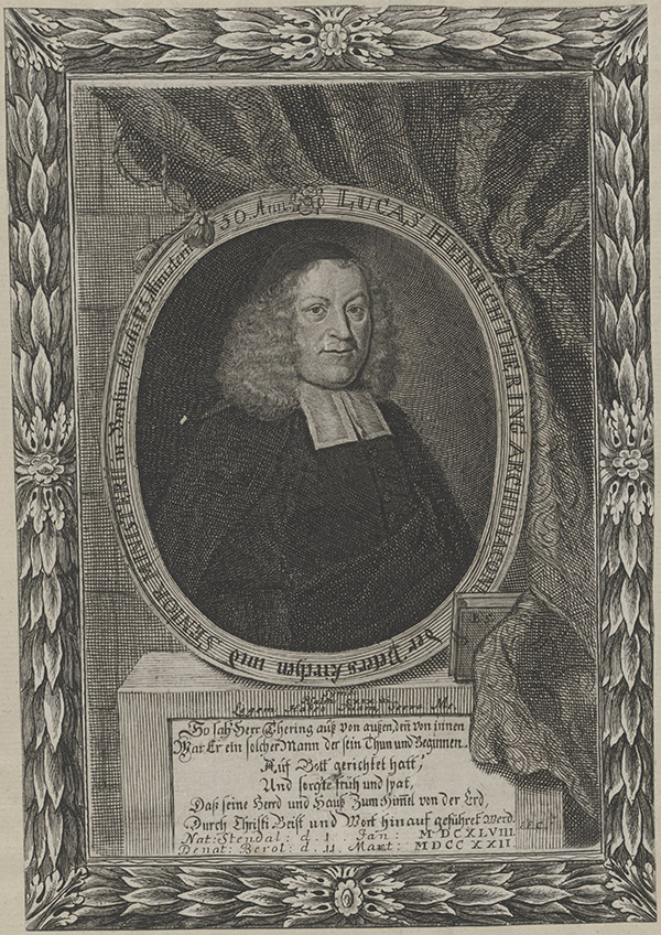 Bild Lucas Heinrich Thering (1661-1722, Archidiakon in Berlin